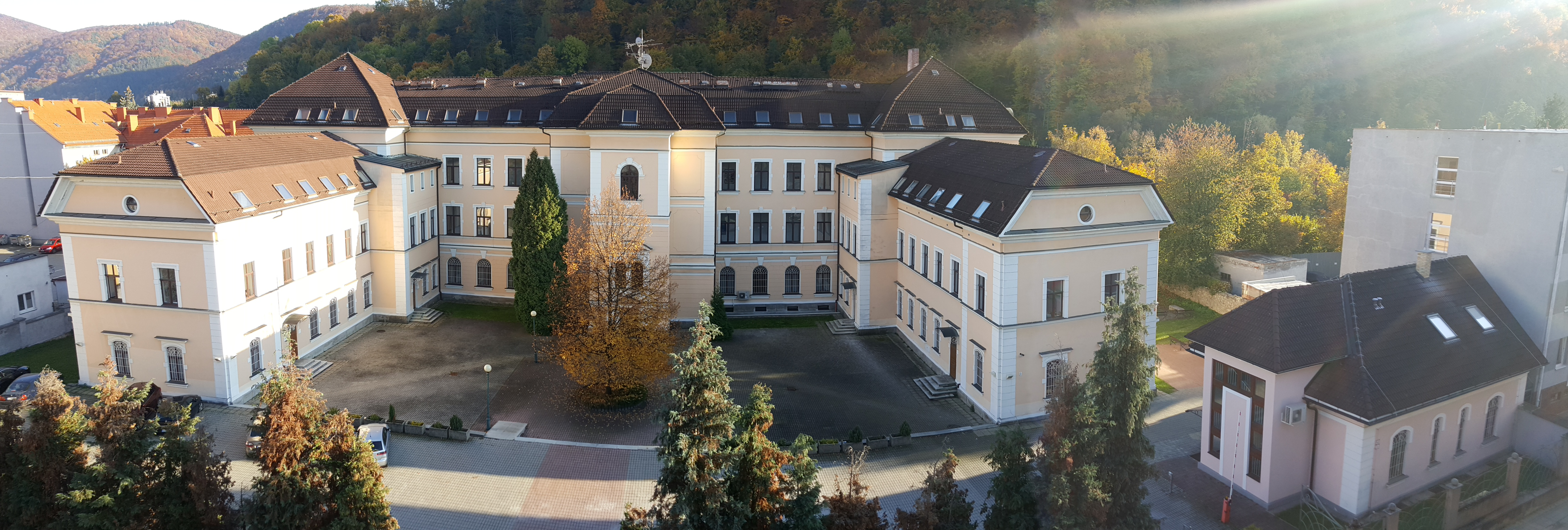 Budova fakulty z Kuzmányho ulice